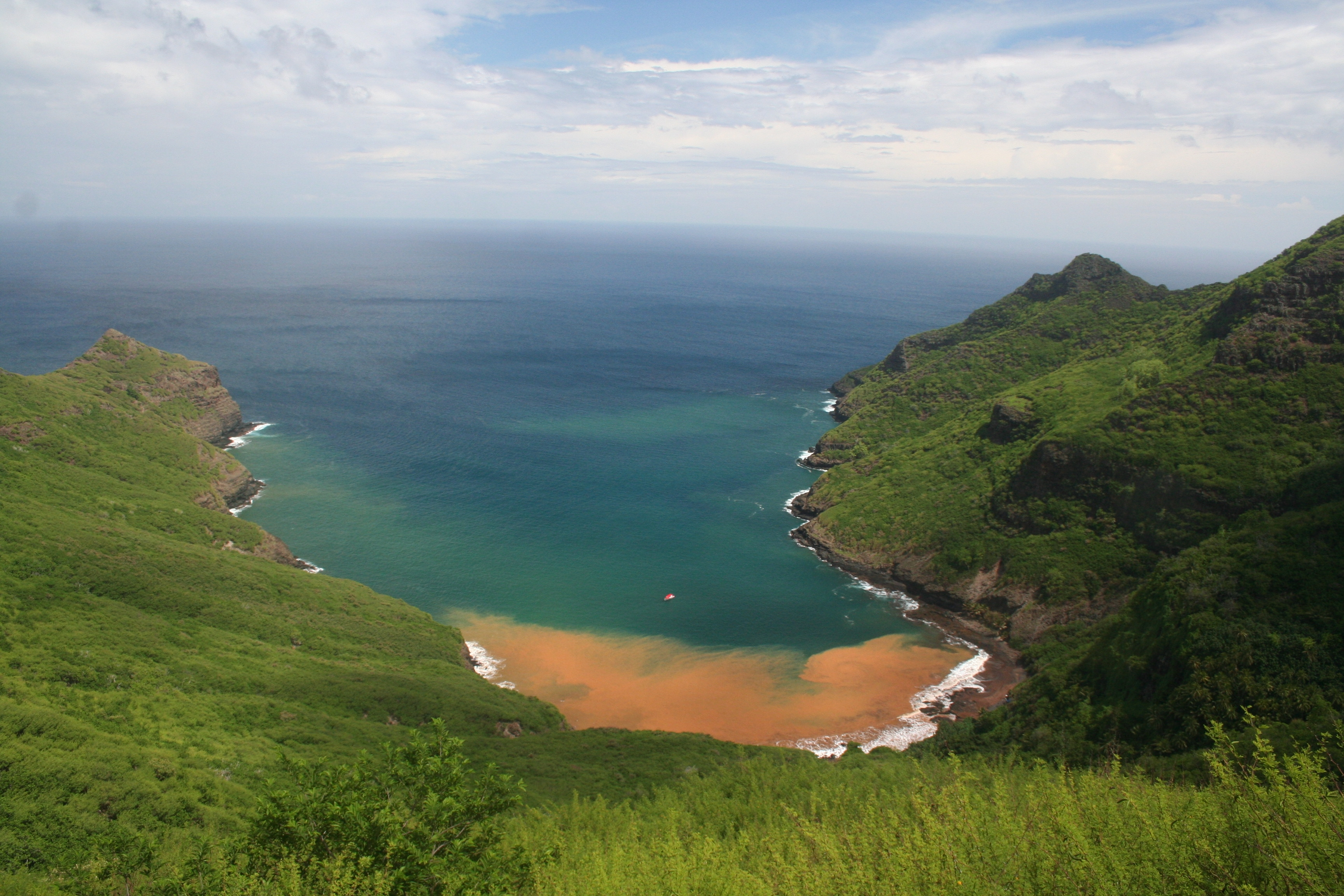 Eiao. Photo de la baie de Vaituha après des pluies. Les eaux de la baie sont colorées en rouge par la latérite durant plusieurs jours. Photo prise lors dela mission scientifique DIREN